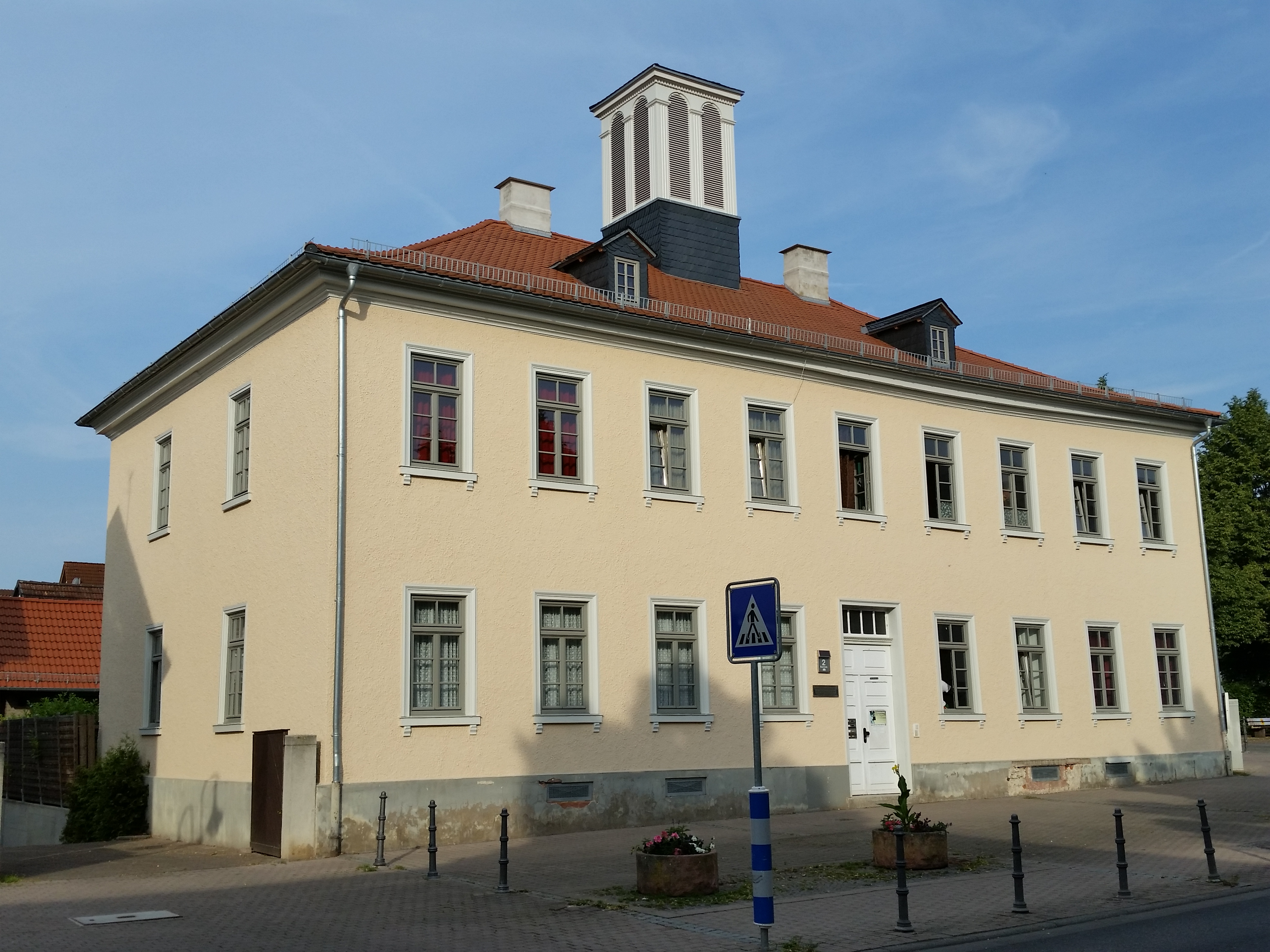 Die Alte Schule am Kirdorfer Kreuz (gebaut 1827)